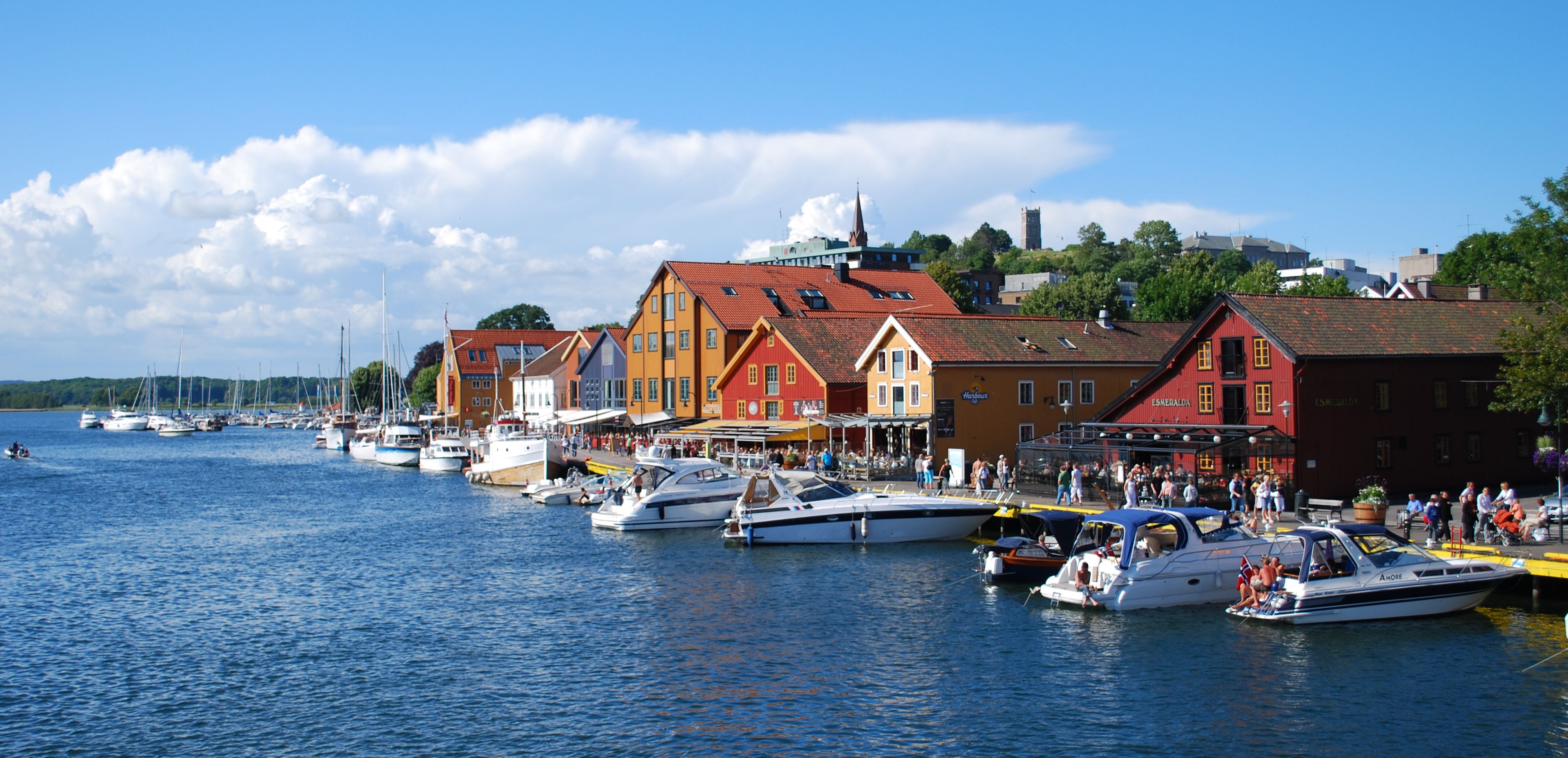 Brygga i Tønsberg med gjestehavnen i bakgrunnen